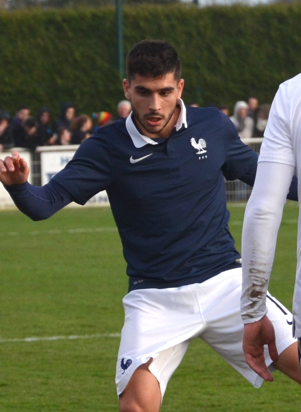 Photographie prise lors du match opposant la France à l'Angleterre pour les qualifications du championnat d'Europe de football des moins de 19 ans 2015 au stade Louis-Villemer de Saint-Lô le 31 mars 2015. Ici, Neal Maupay.